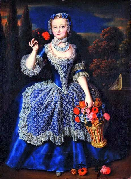 Maria Amalia, Gräfin von Brühl als Kind